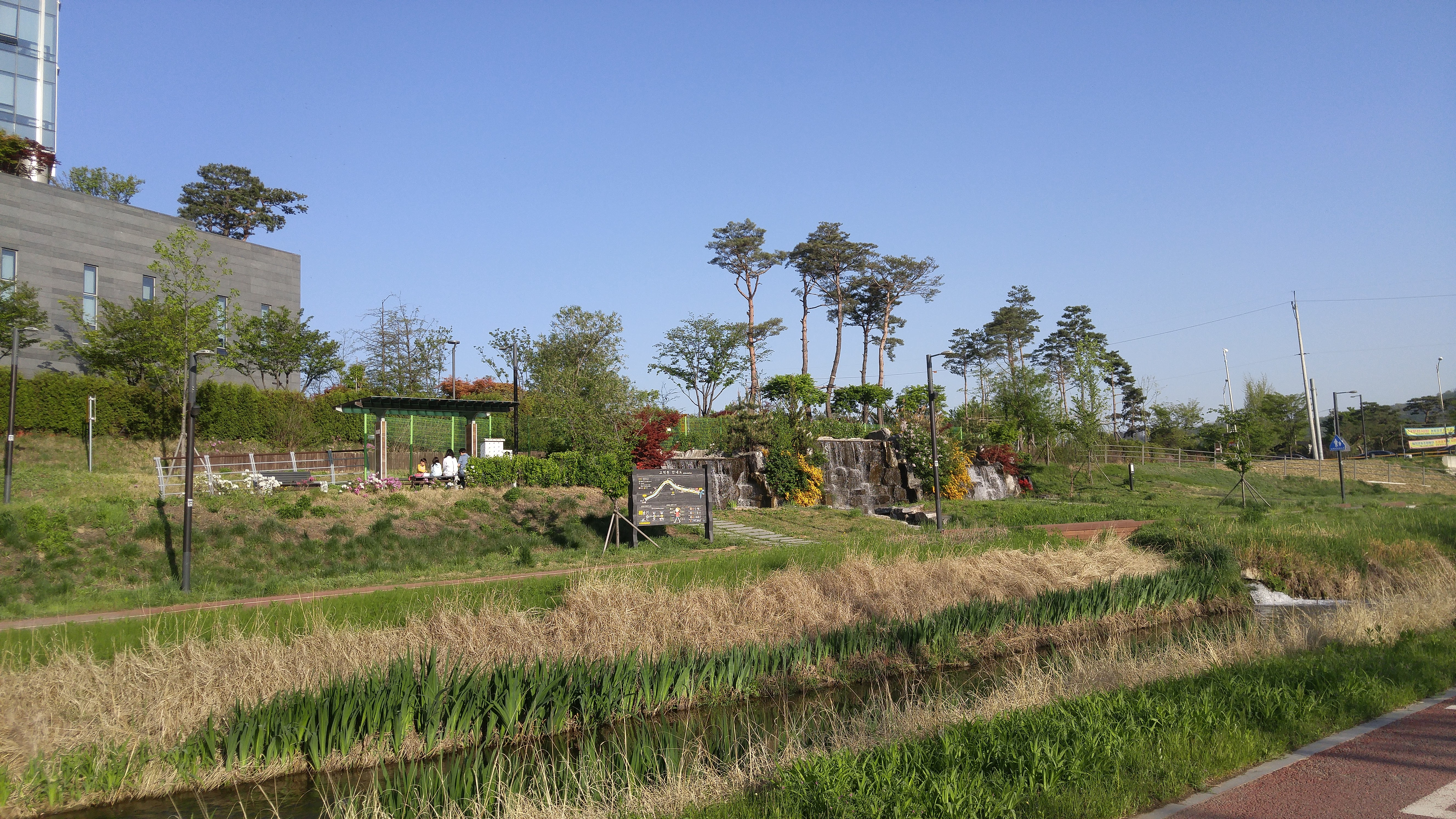 삼성 엔지니어링 본사 인근 공원